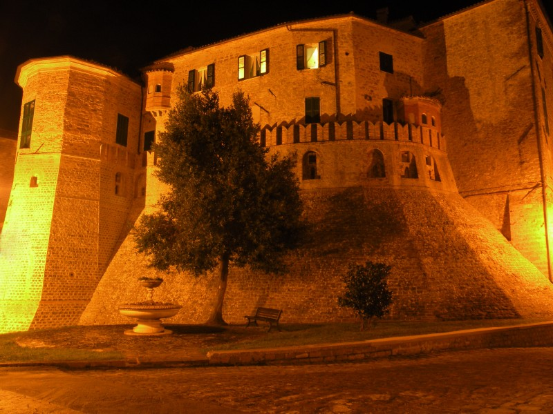 Il castello comunale di Monte Roberto illuminato di notte